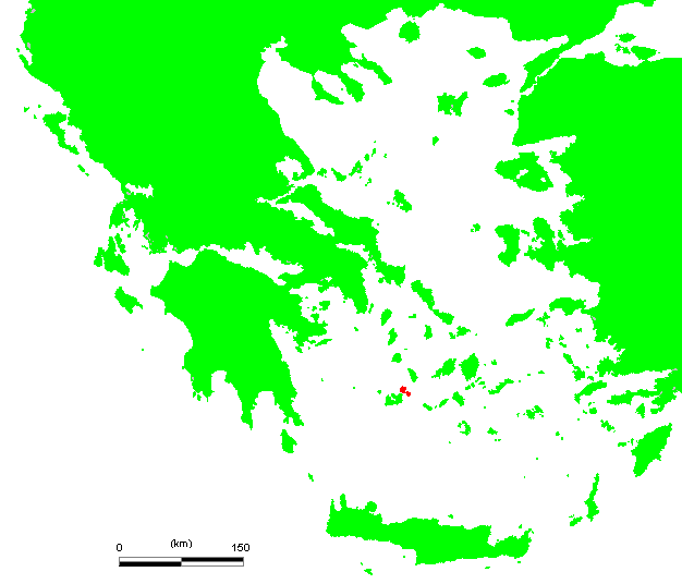 GR Kimolos.PNG (Greek island)